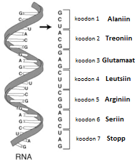 Koodoni vastavus aminohappega